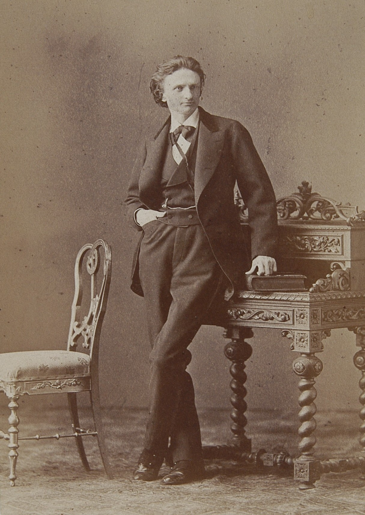 wg właściwości